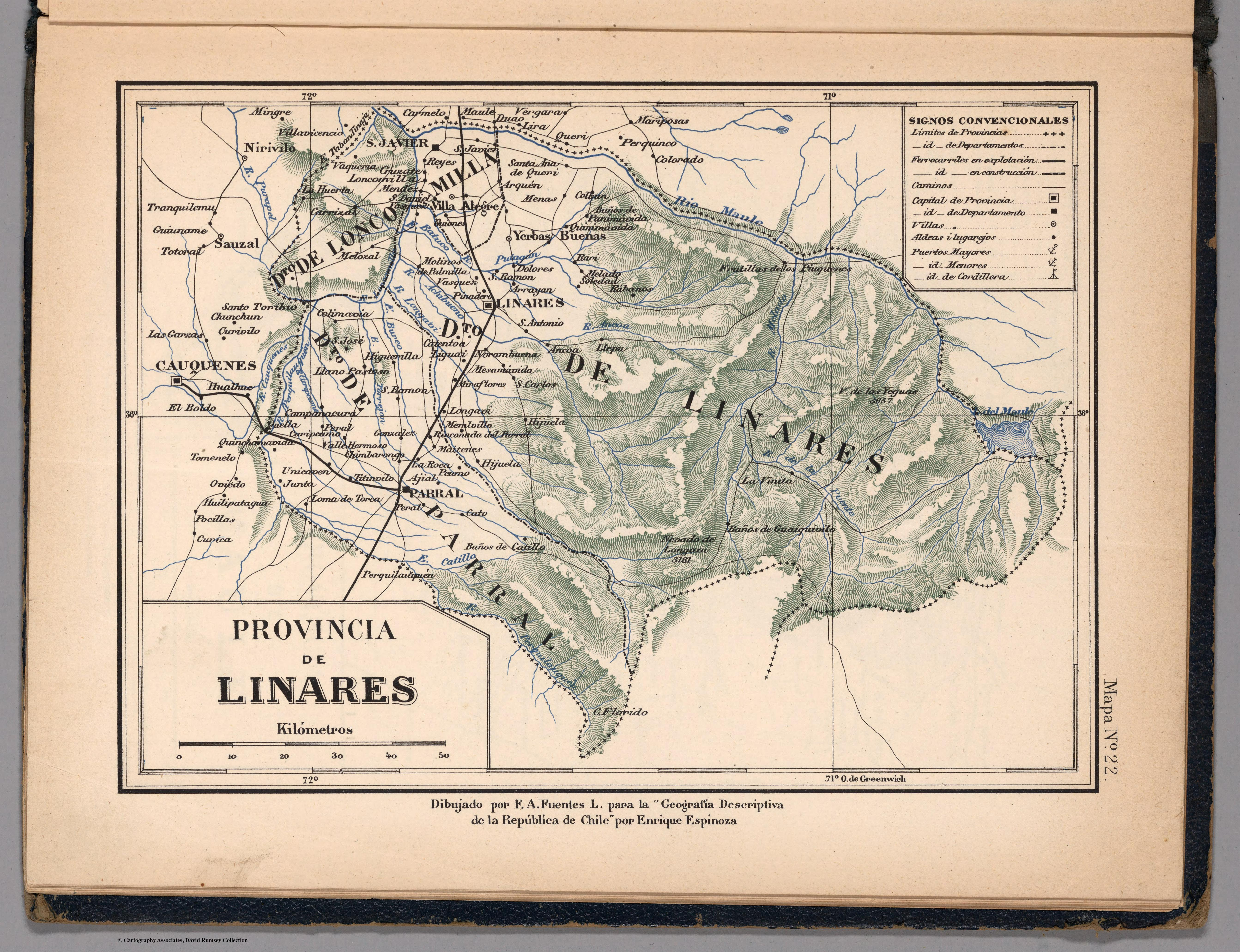 Atlas de Chile Arreglado para la Jeografia Descriptiva de la Republica de Chile por Enrique Espinoza.